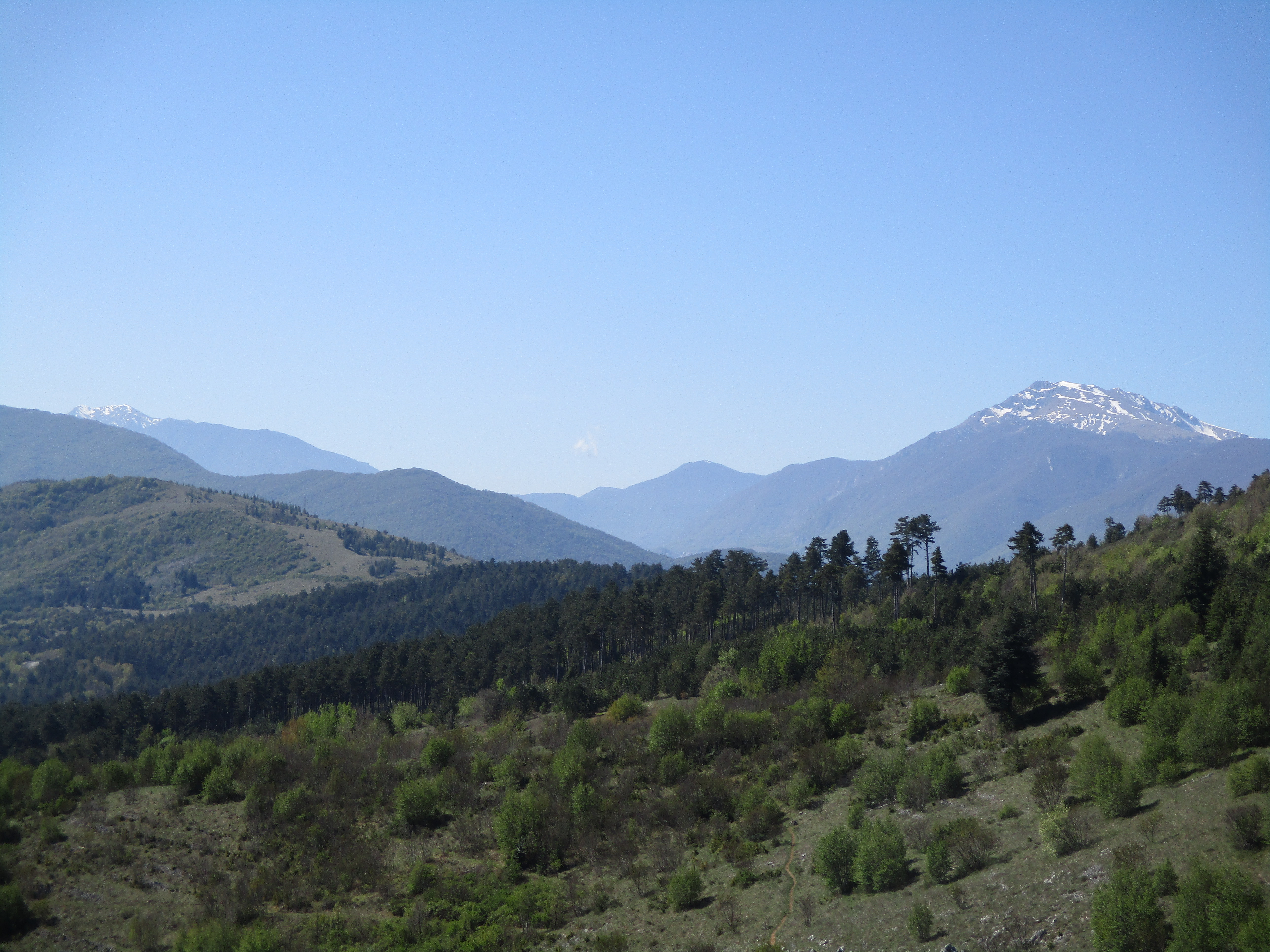 Veduta del monte Viglio dal monte Cimarani